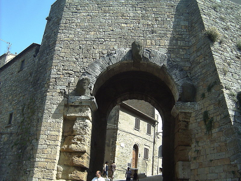 Porta dell'Arco de Volterra province de Pise Toscane